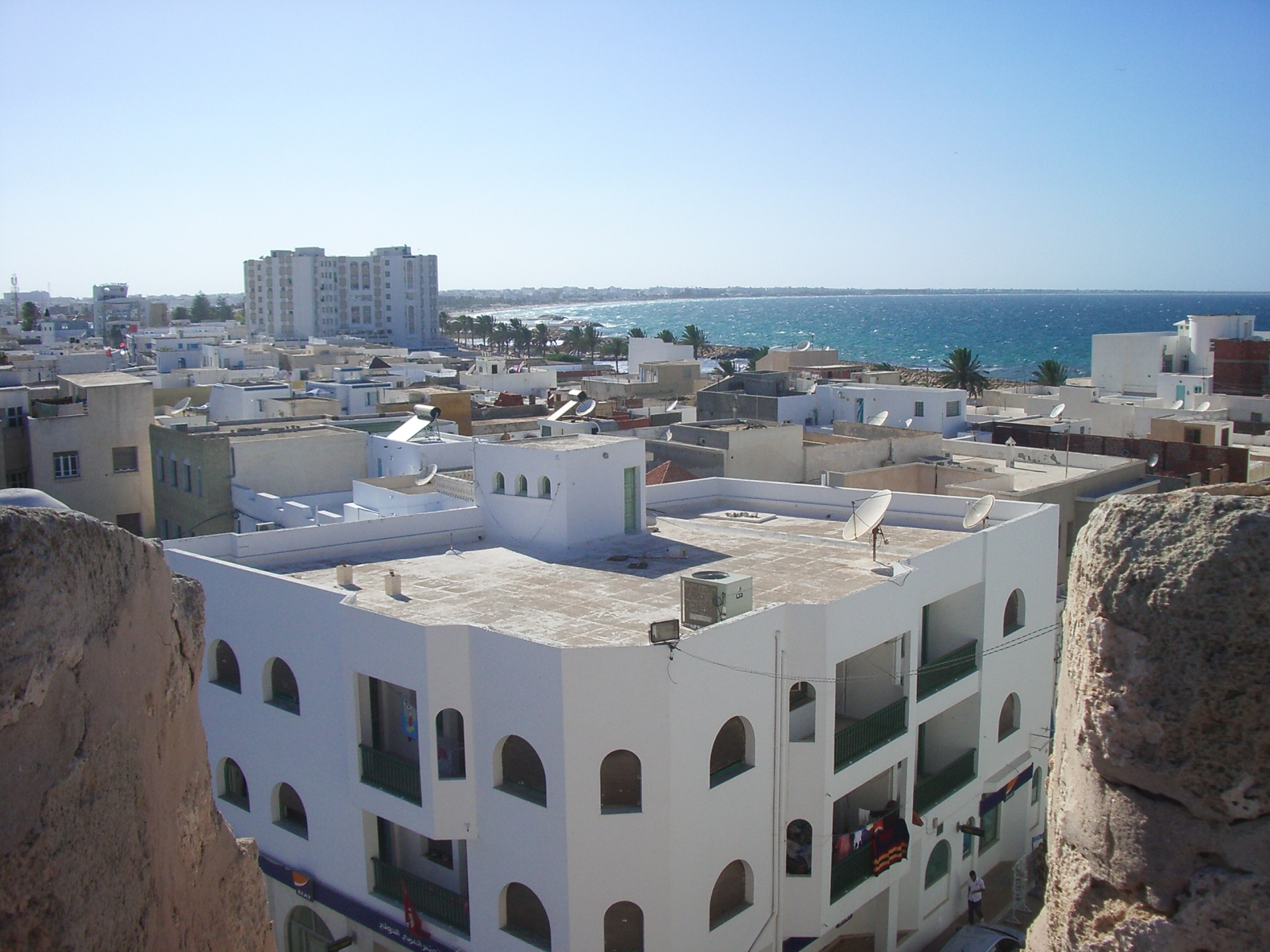 Vista de Mahdia desde la Torre Obscura